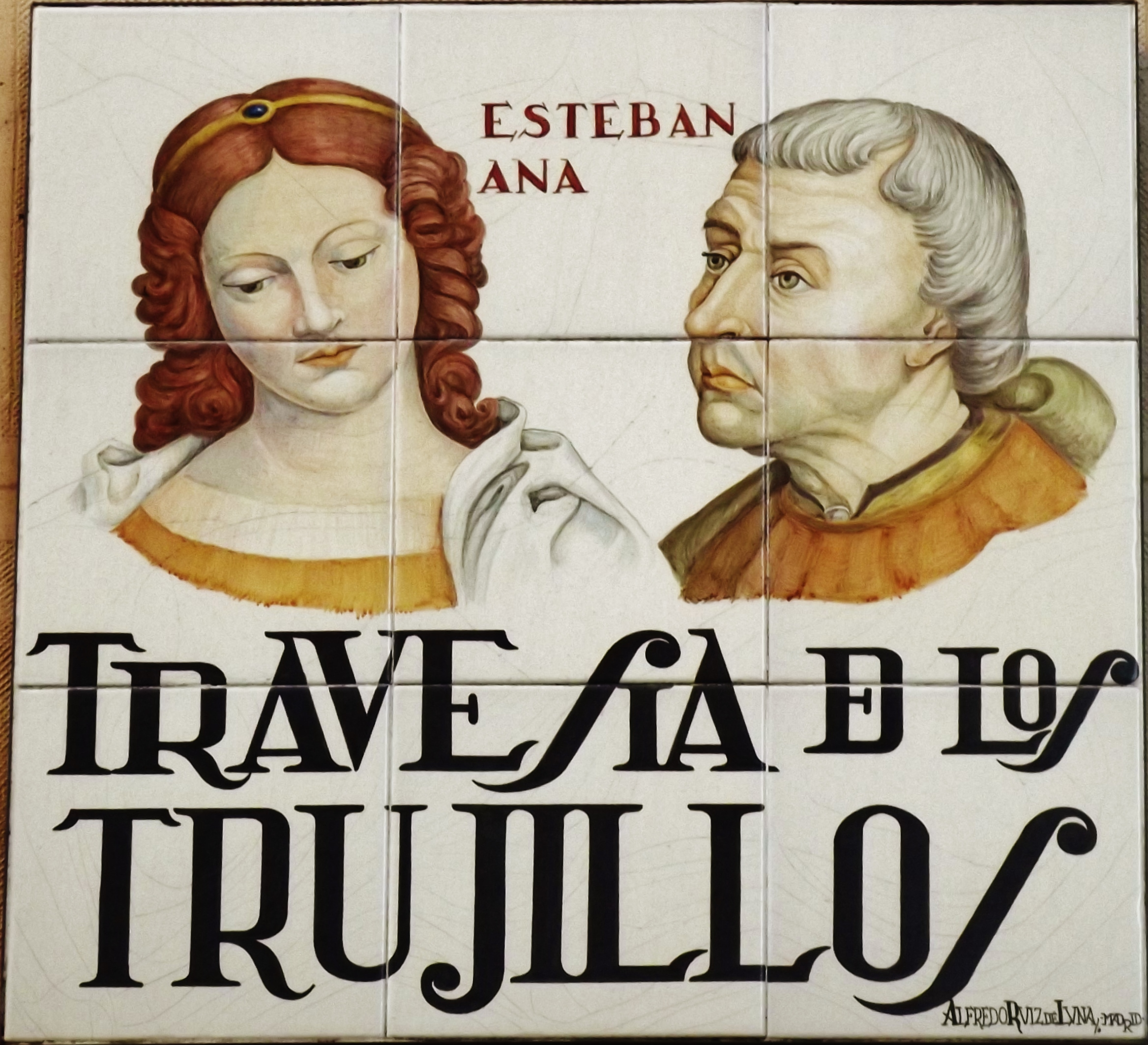 Placa de la travesía de los Trujillos, de Alfredo Ruiz de Luna